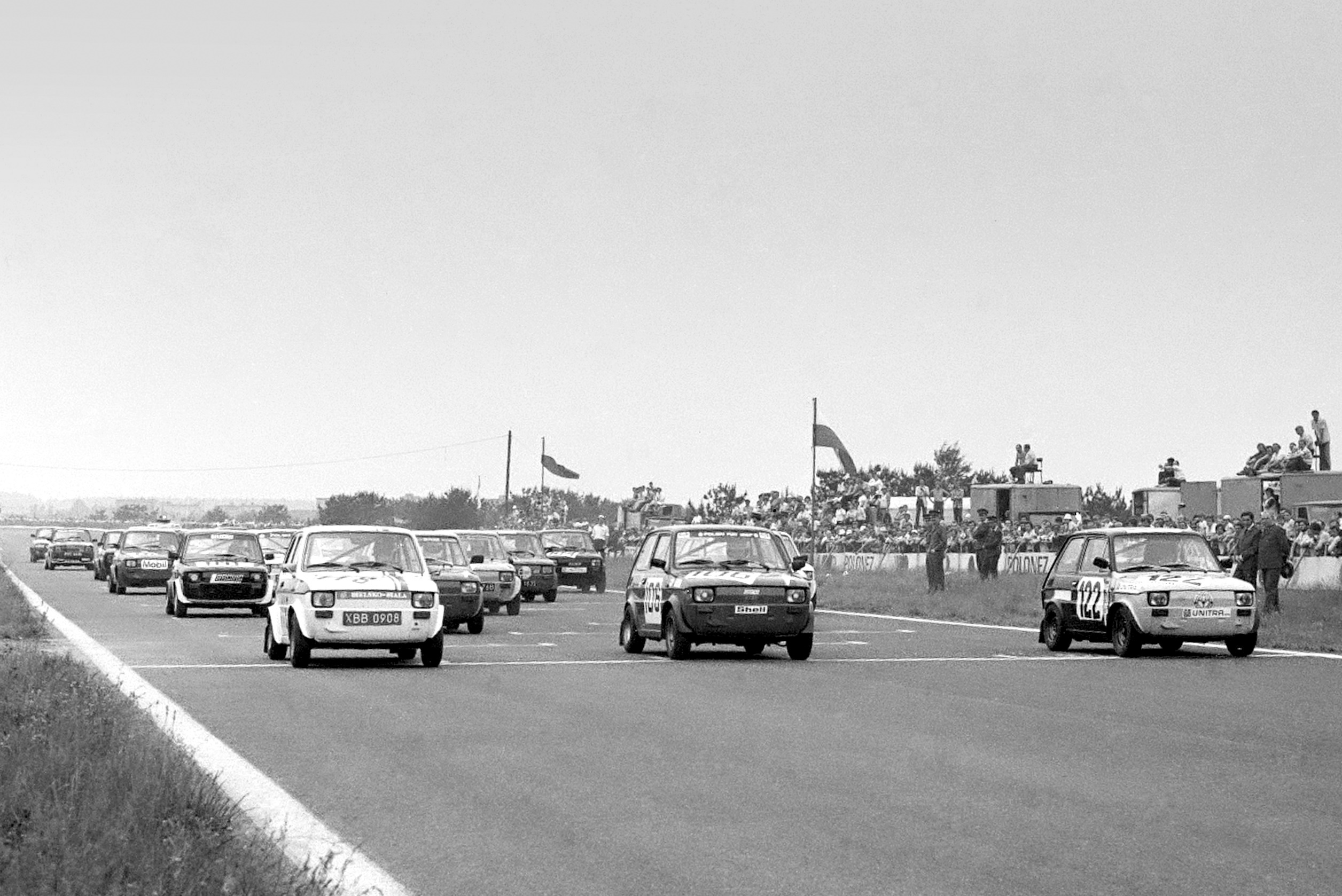 Polskie Fiaty 126p jako samochody wyścigowe. 15. 06. 1980 r., III Targowy Wyścig Samochodowy na Torze Poznań ( nr 118 - Andrzej Lubiak AP-Beskidzki, zwycięzca; nr 106 - Włodzimierz Krukowski, AP Kielce, III miejsce; nr 122 - Eugeniusz Zarzycki, AK-Rzemieślnik )